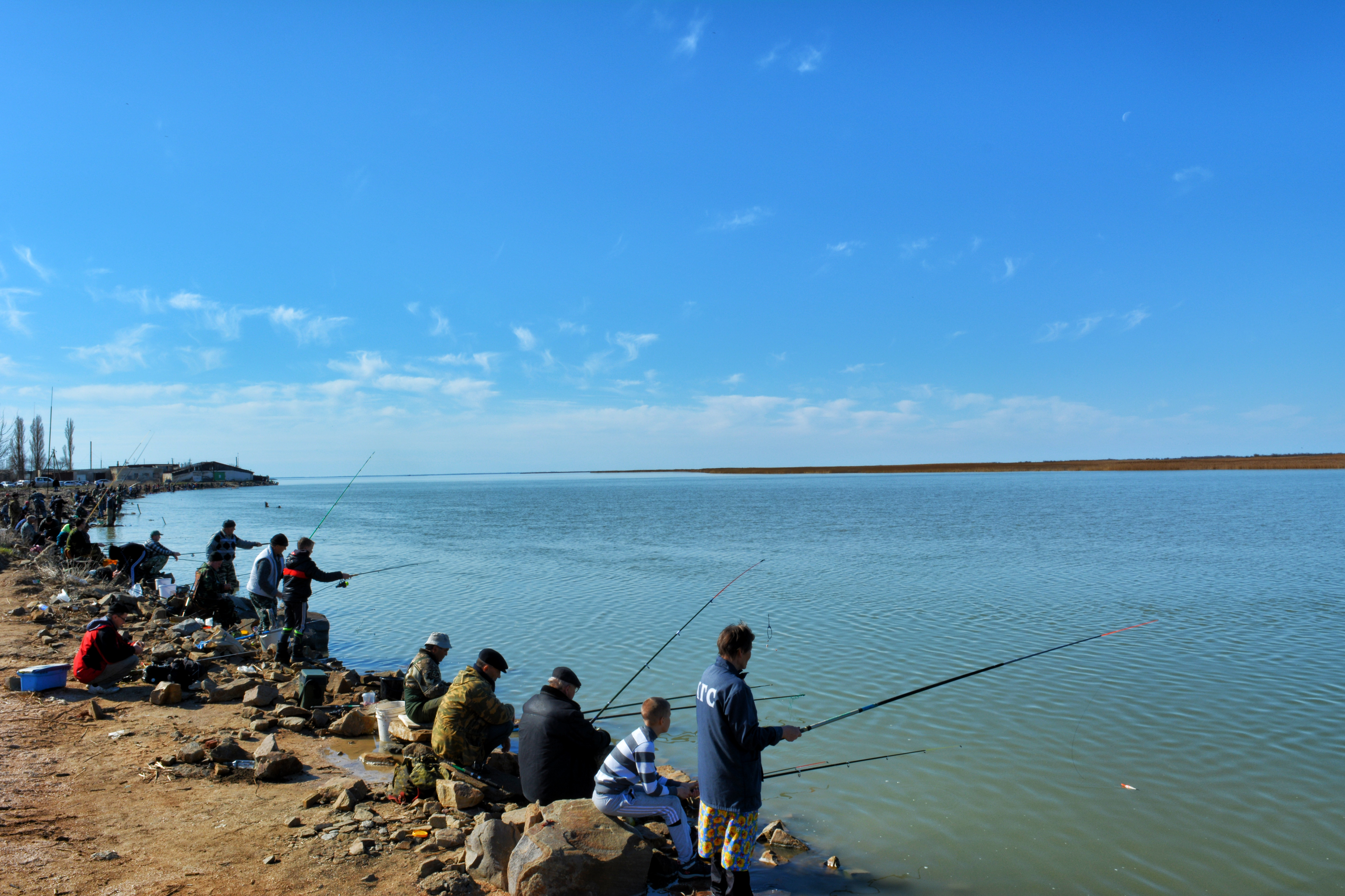 Ясенская коса, Приморско-Ахтарский район This image is related to the protected area of Russia number 2320287